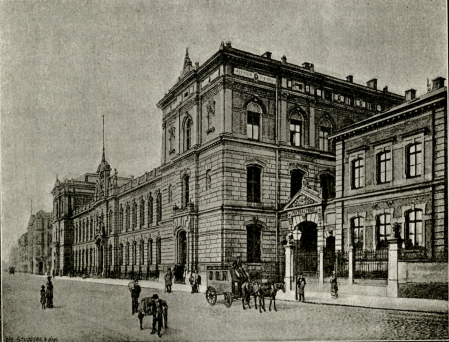 Das kaiserliche Paket- und Zeitungspostamt in Leipzig am Johannisplatz im Jahre 1892. Prager Straße, damals Hospitalstraße 4-10. Stich aus Leipzig und seine Bauten, S. 145